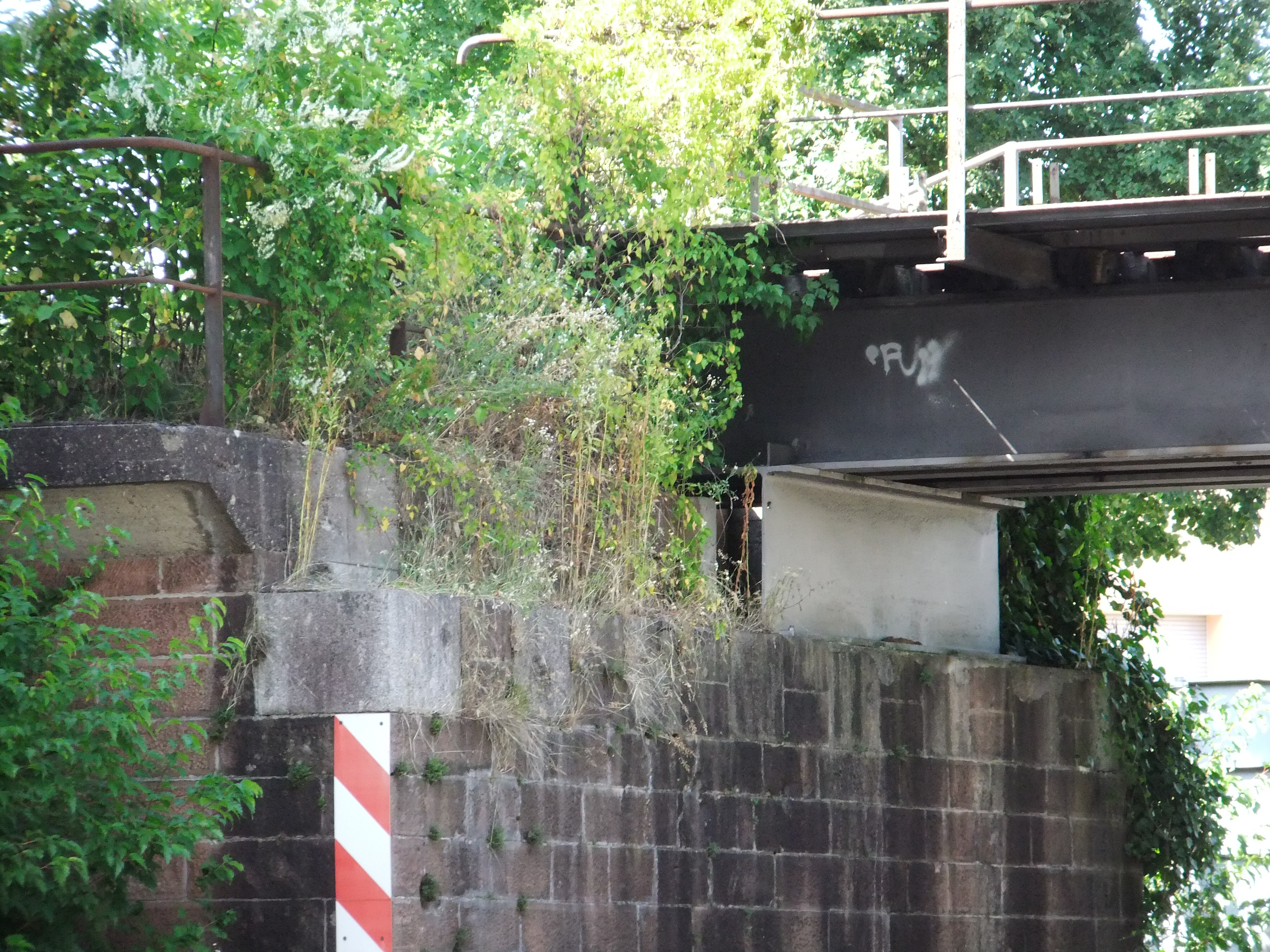 "Aufgebockte" und so aus militärischen Gründen stets wieder betriebsbereit machbare Bahnbrücke über die L78a bei Wintersdorf